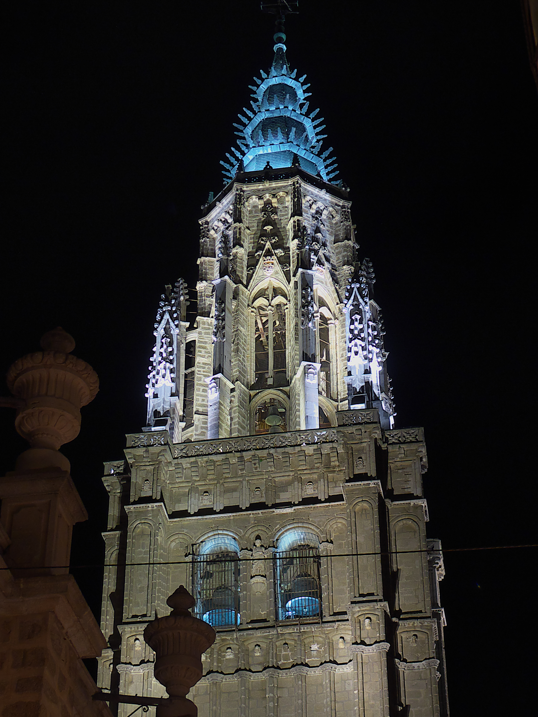 Campanario. Cuerpo superior de la torre, culminado por el maestro mayor de la Catedral, Hanequin de Bruselas (1442)